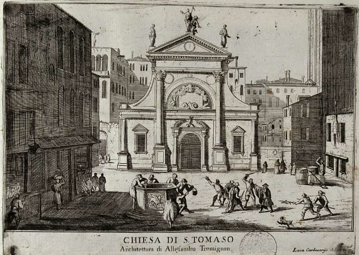 Rappresentazione della chiesa di San Tomà di Venezia prima del 1703